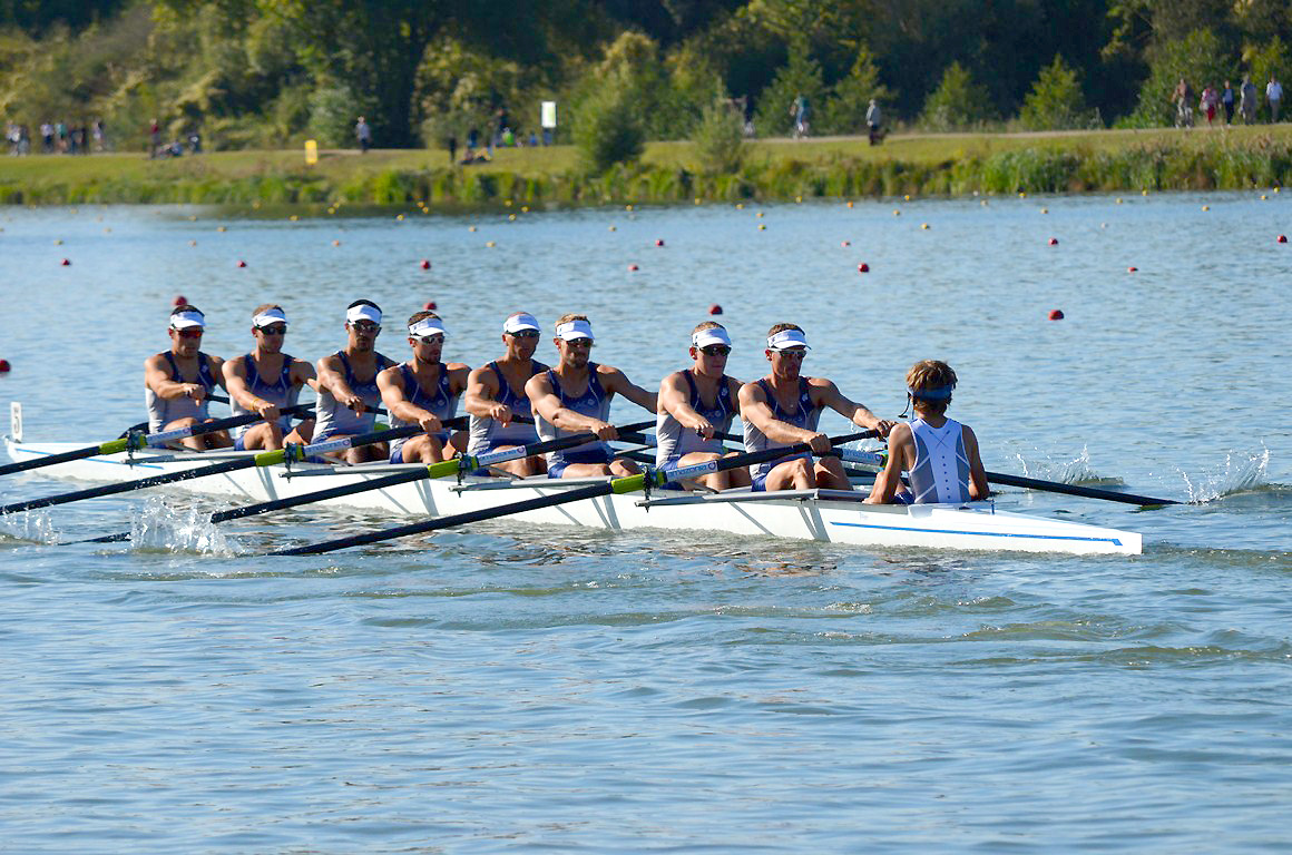 Championnat de France 2012 - Mantes la Jolie